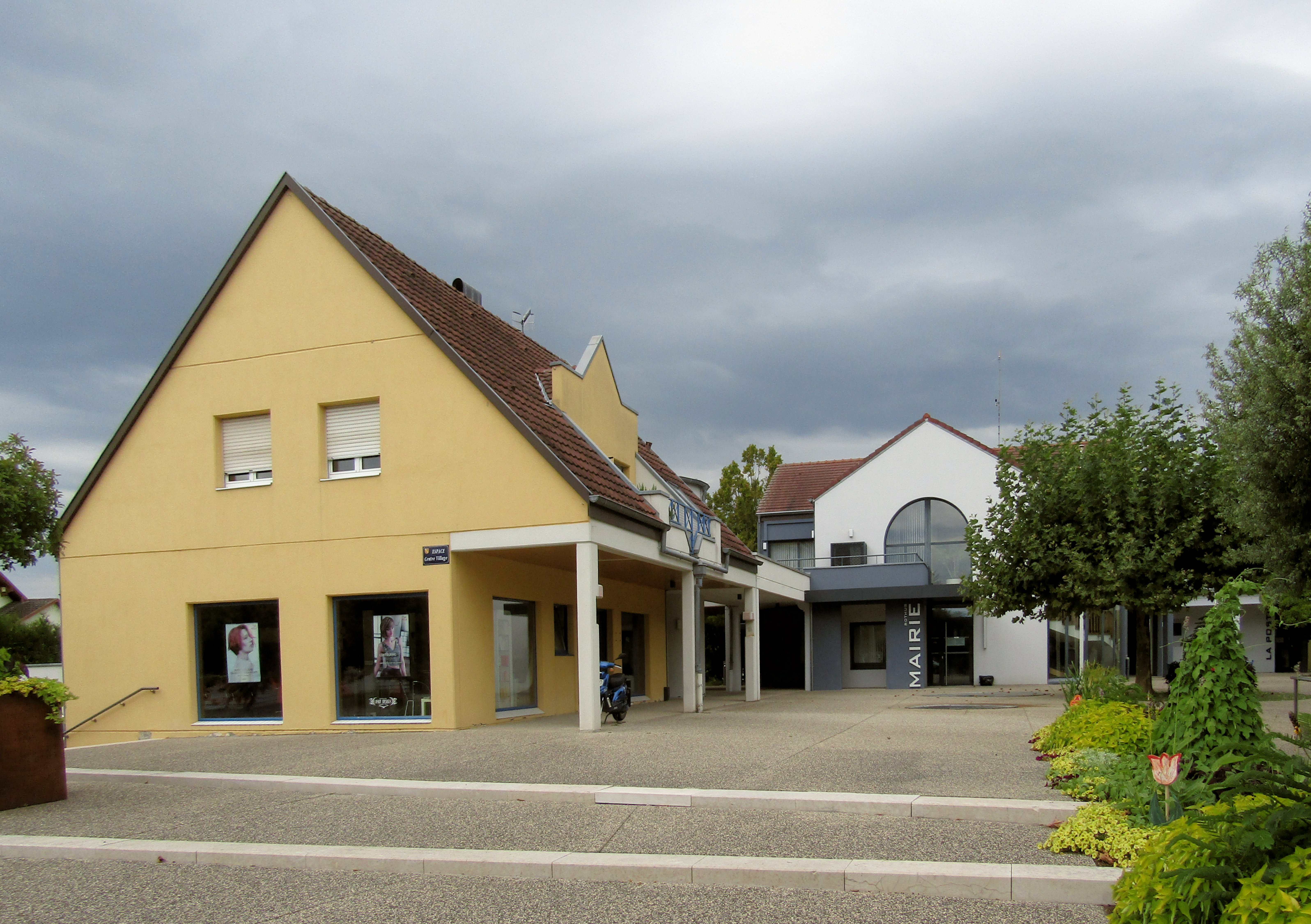 La mairie de Chalampé